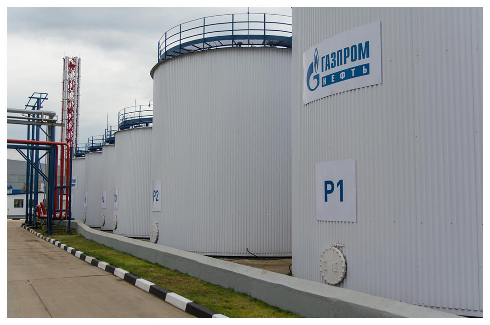 Пресс-тур на Московский завод смазочных материалов во Фрязине. Фото с официального сайта ООО "Газпромнефть - Смазочные материалы", иллюстрирующее деятельность компании.